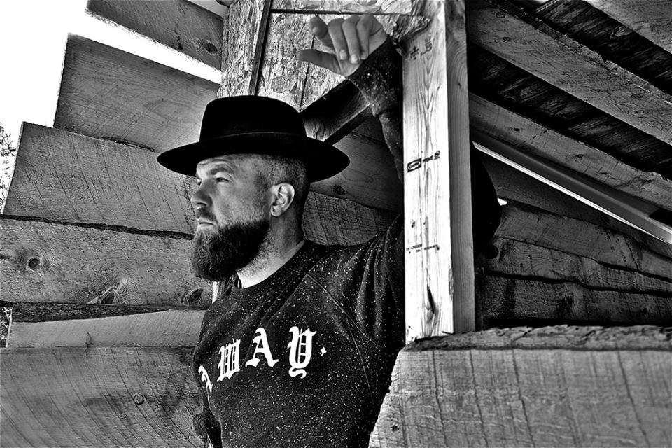 Miles Bonny 2014